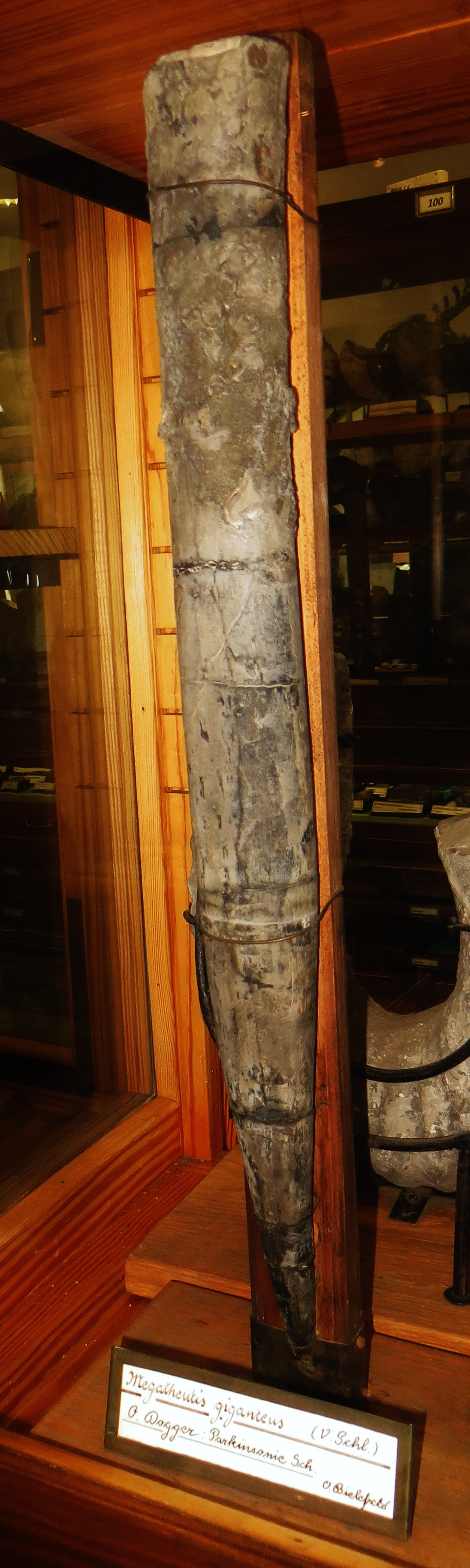 Fossil of Megateuthis - Took the picture at Natural History Museum, Bonn University